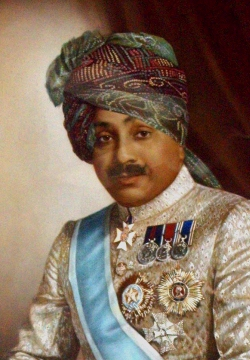 Umaid Singh